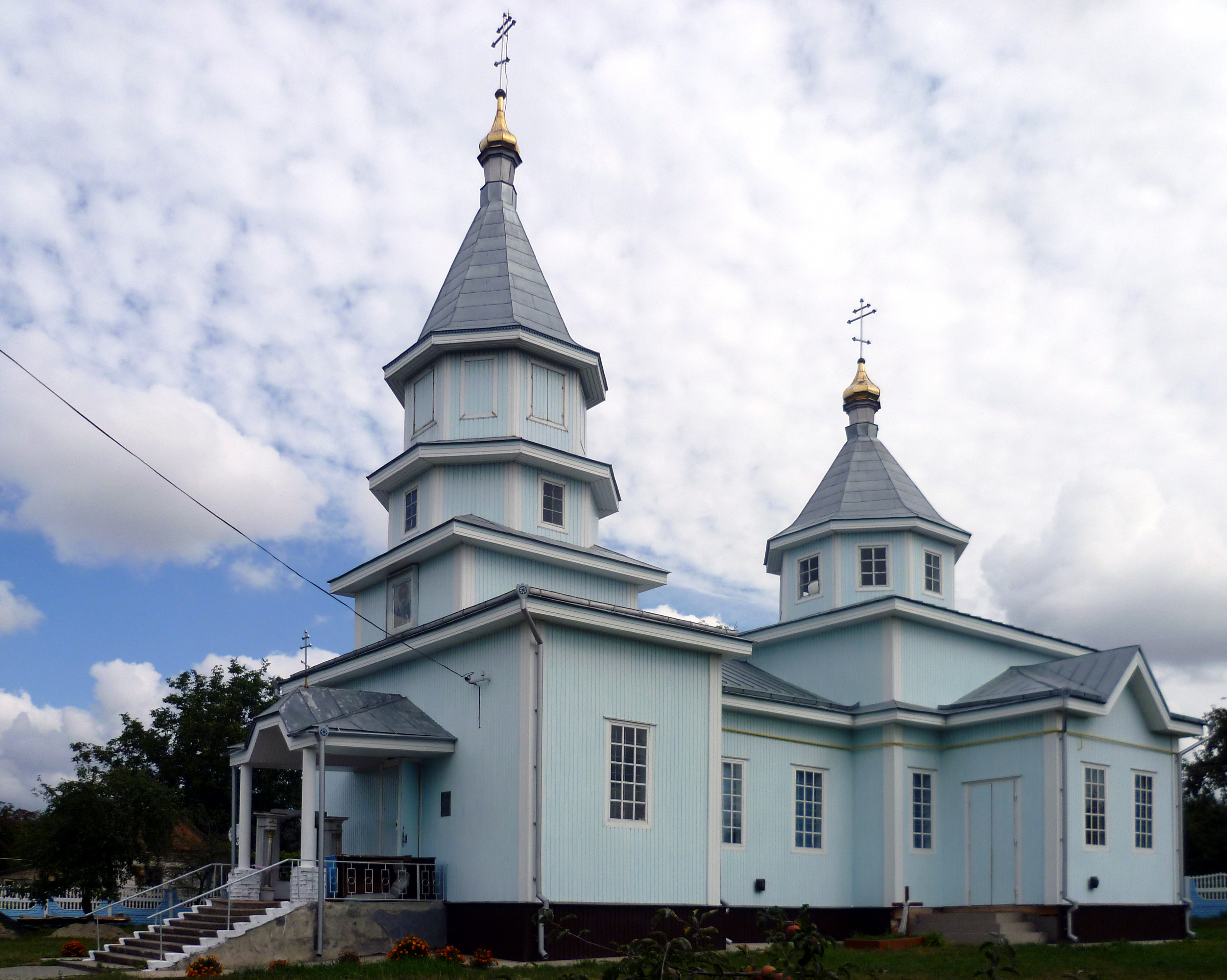 Миколаївська церква (1913 р.) - вигляд з південного заходу - смт Локачі Волинська область Україна